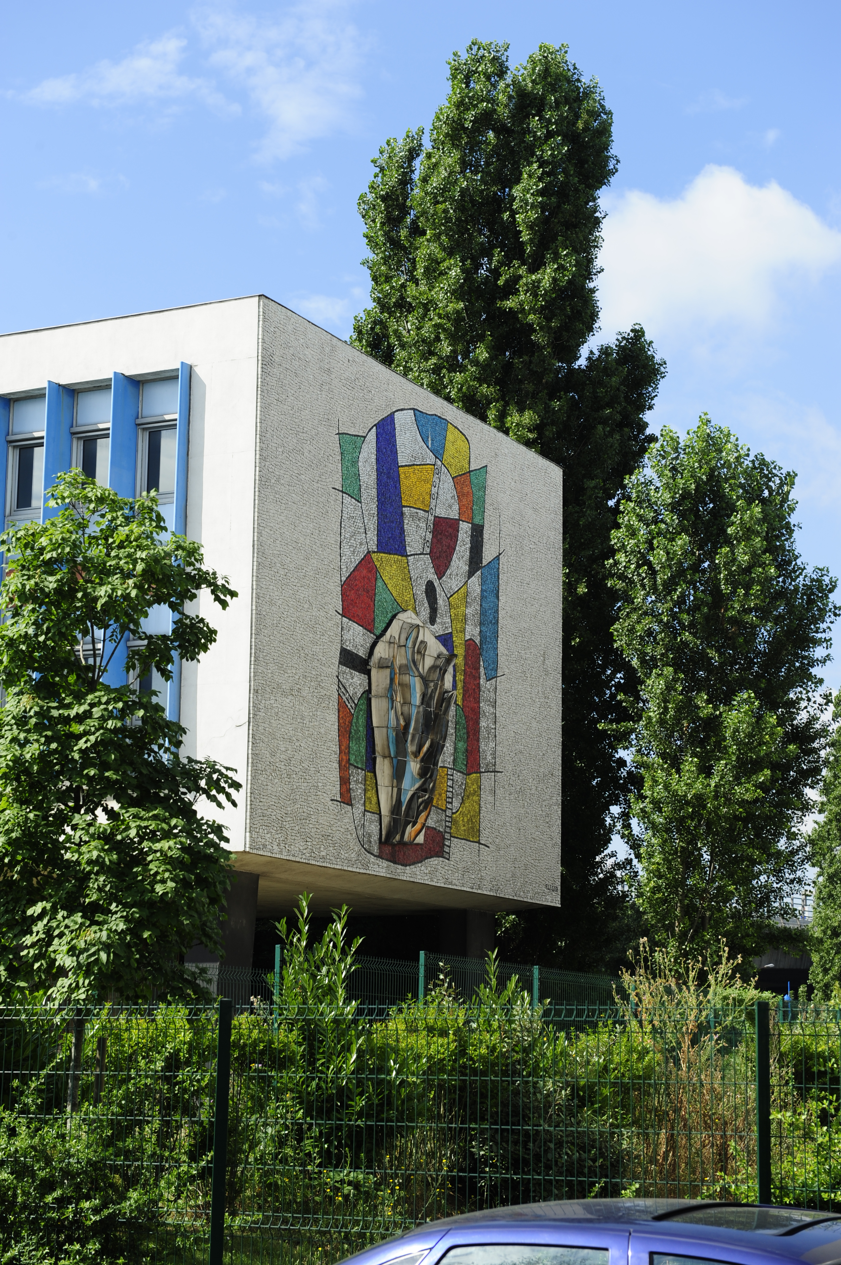 Cokerie Paris-Sud bâtiment social